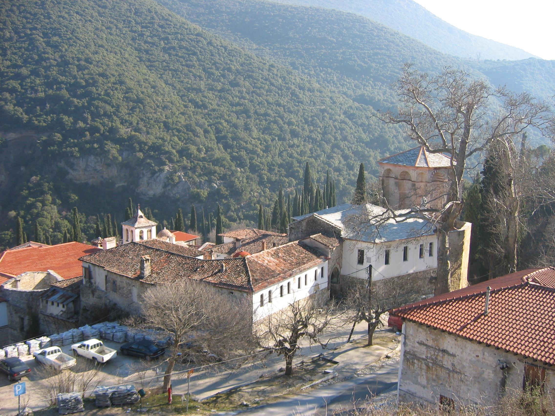 Панорама на Серския манастир "Свети Йоан Предтеча".